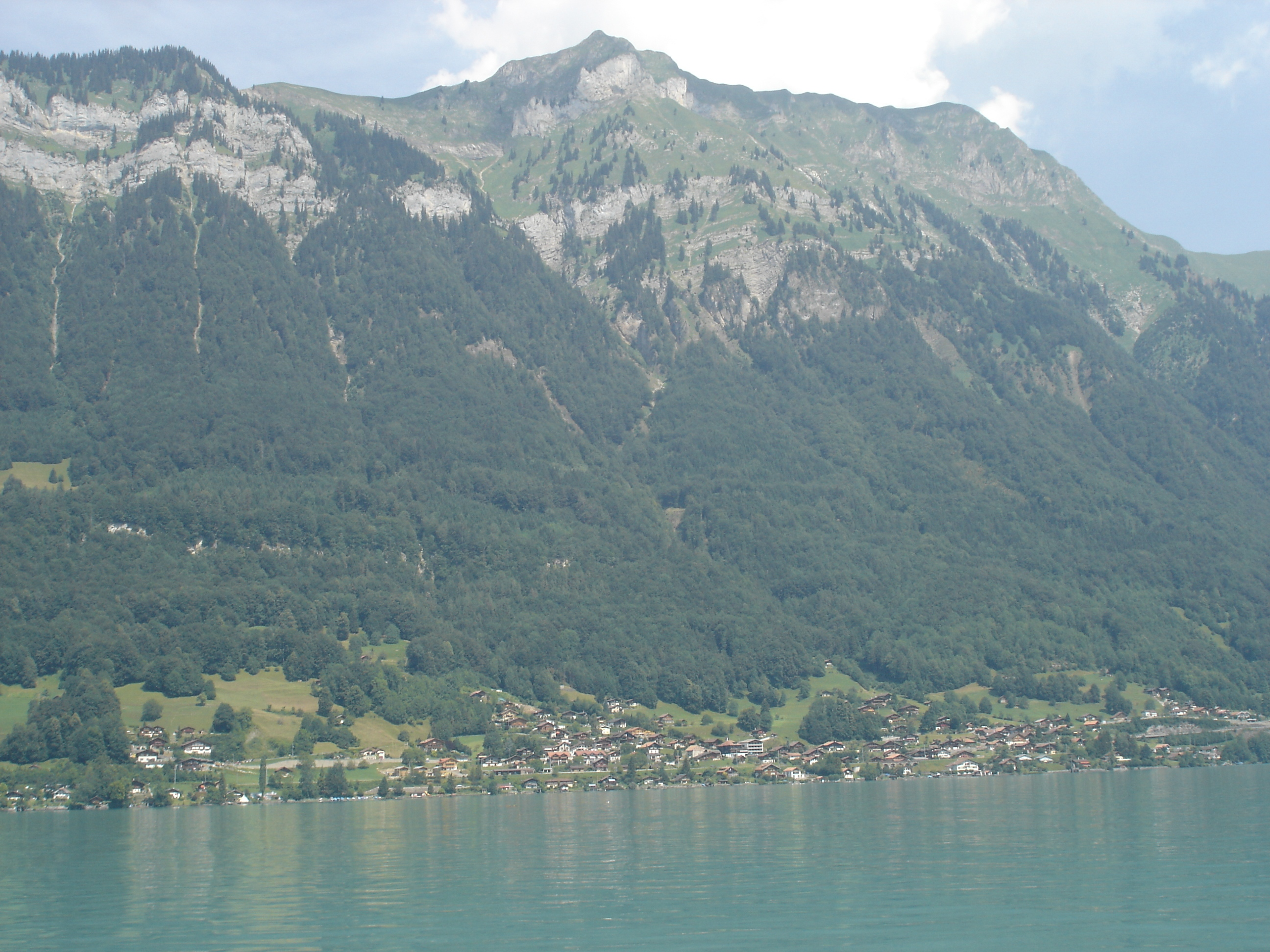 Niederried am Brienzersee